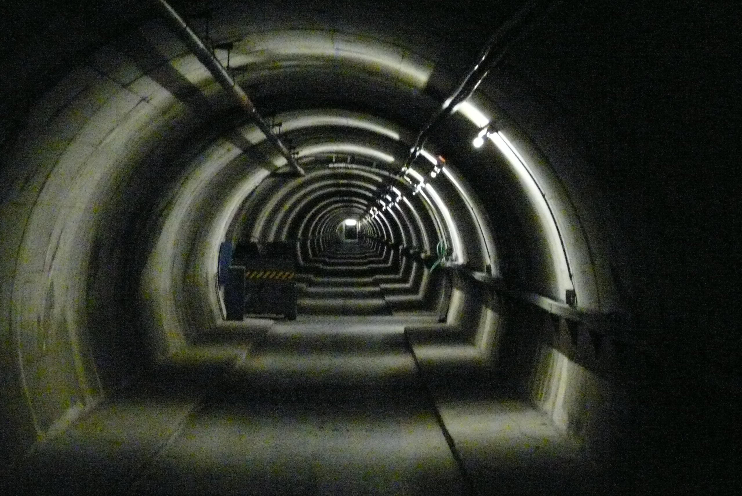 Poste de conduite de tir N°1, Galerie anti-souffle, Rustrel (84)